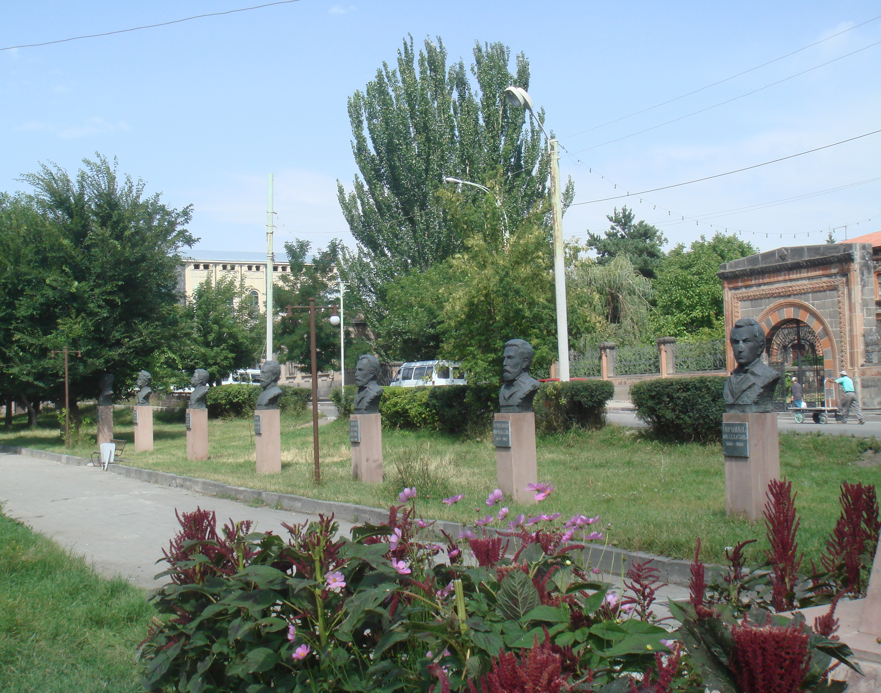 Հայդուկների պուրակը Գյումրիում